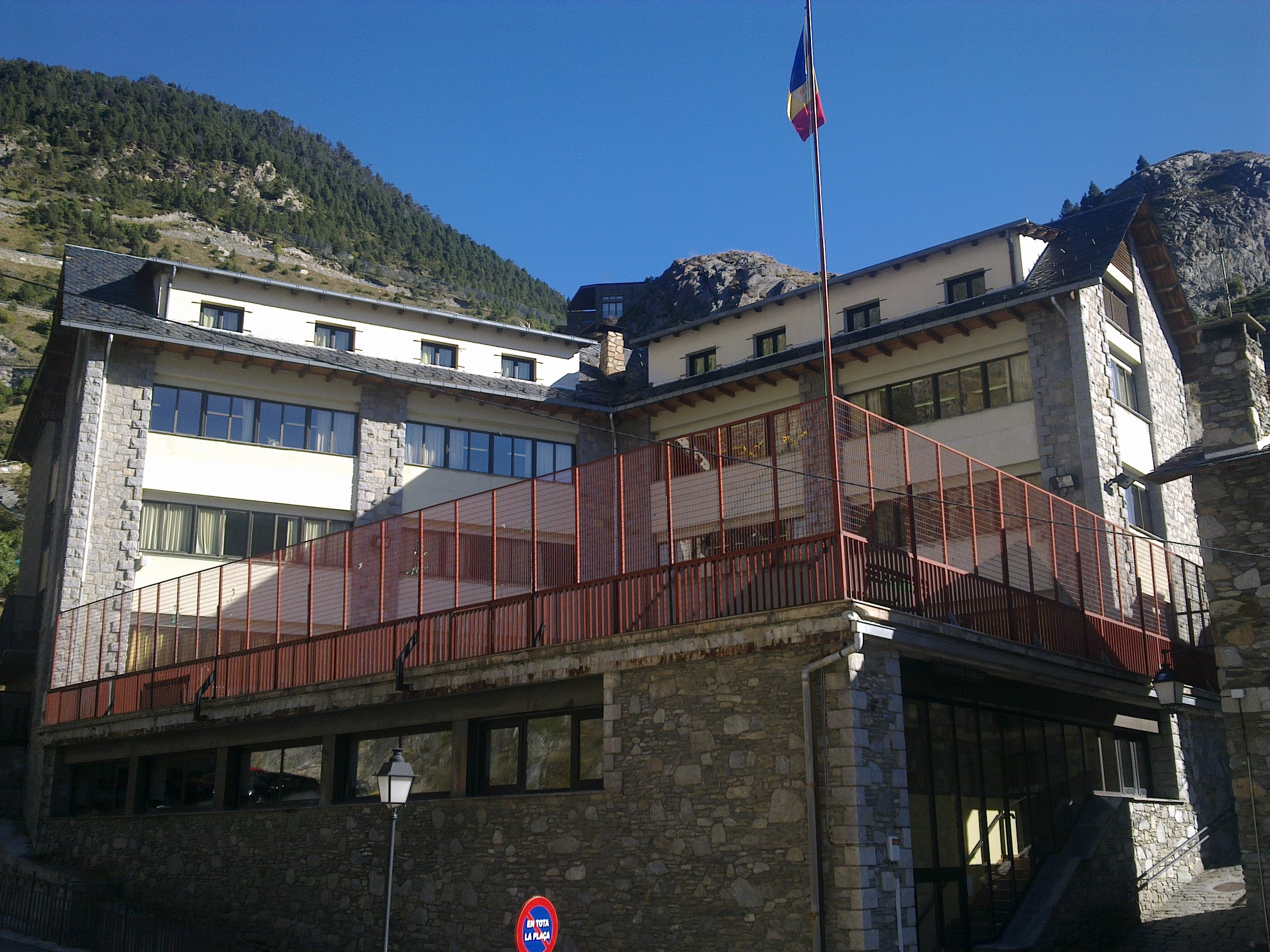 Escoles de Canillo